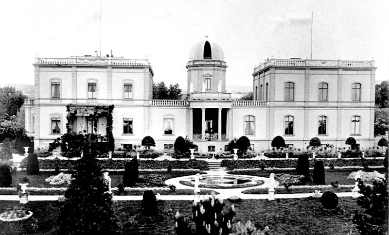 Historische Ansicht Villa Monrepos Geisenheim, 1887. In der Mitte ist das im 2. Weltkrieg zerstörte Observatorium zu sehen.